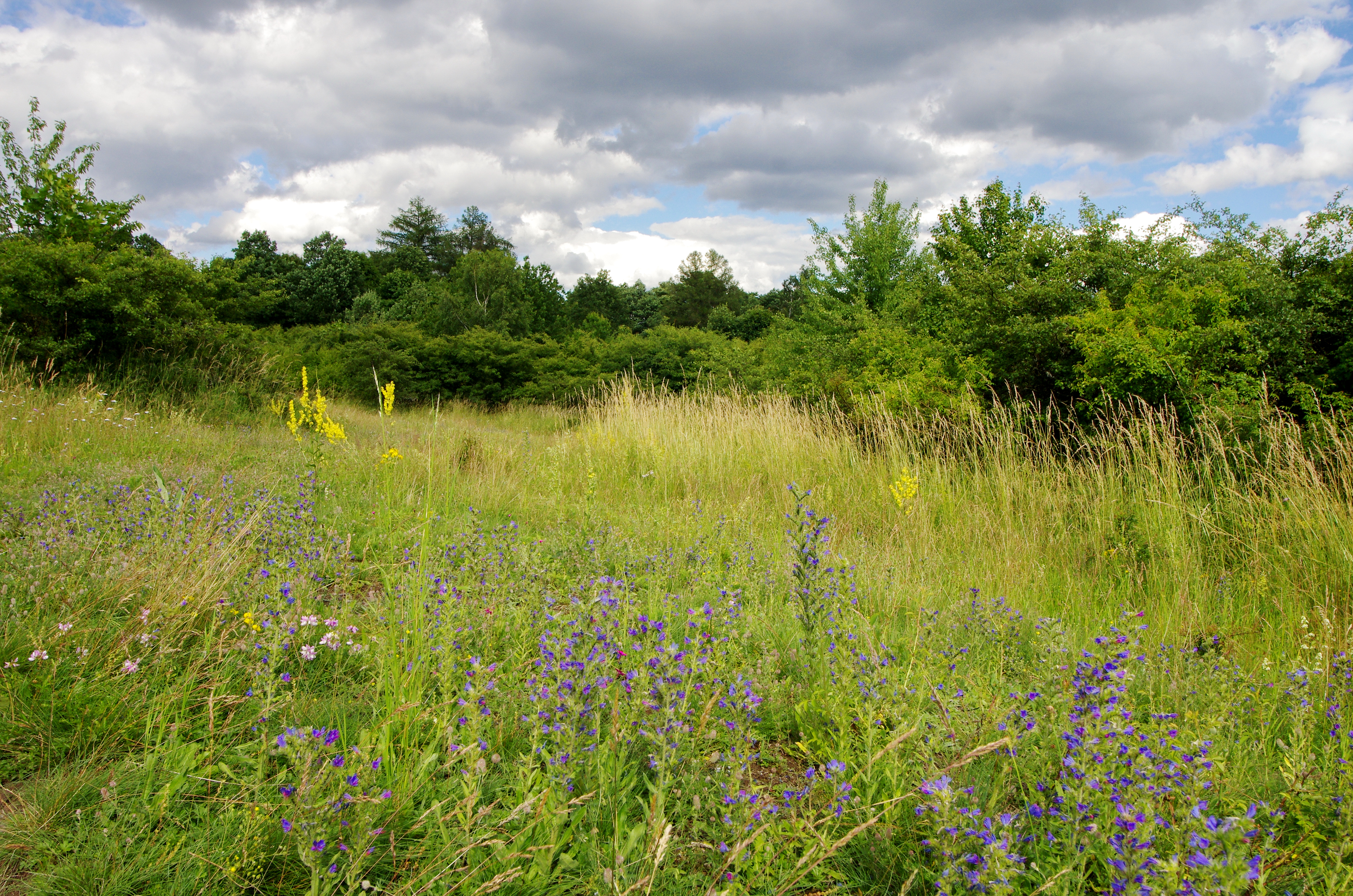 Přírodní rezervace Vladař, vrcholová partie vrchu Vladař, okres Karlovy Vary